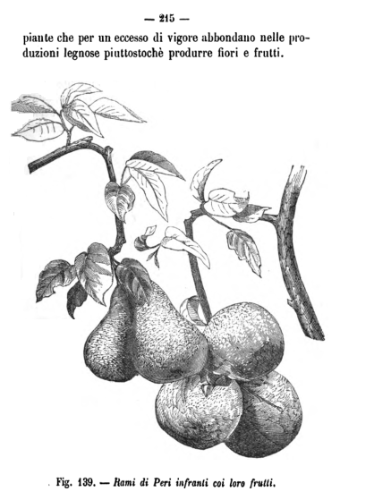 Pere. Dal volume "Corso teorico-pratico sopra la coltivazione e potatura delle principali piante fruttifere" dei fratelli Marcellino e Pietro Giuseppe Roda, 3a ed., 1869.